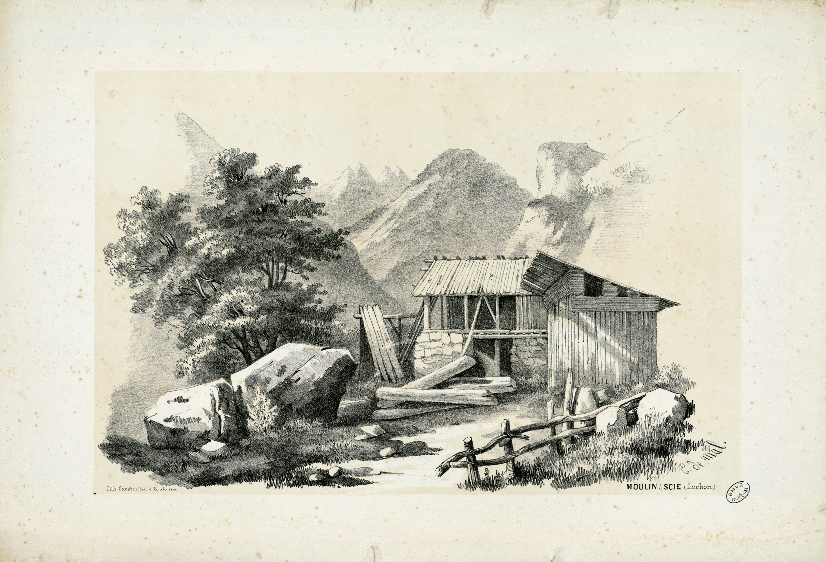 Fait partie d'un recueil de 23 planches lithographiées en camaïeu Ancely, René (1876 - 1966). Possesseur